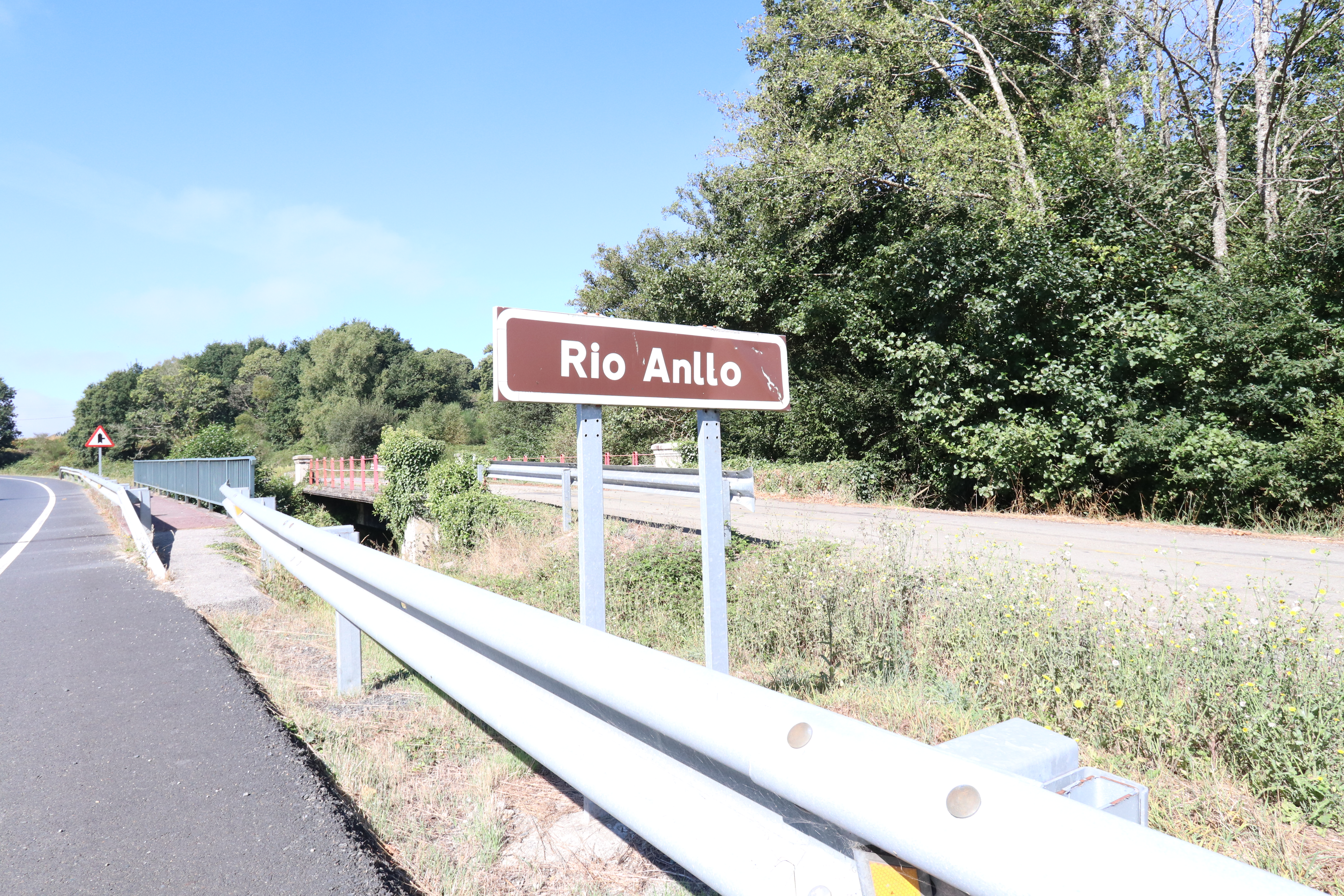 Río Anllo (Galiza).